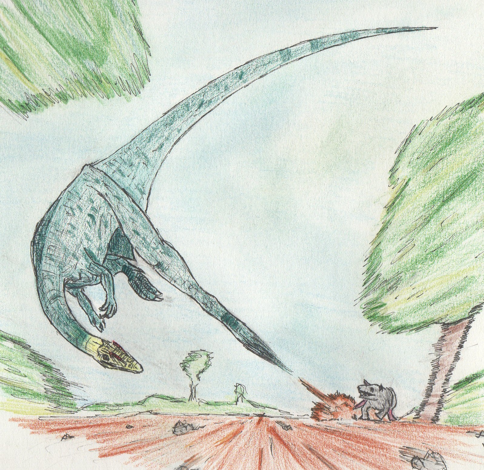 Procompsognathus triassicus